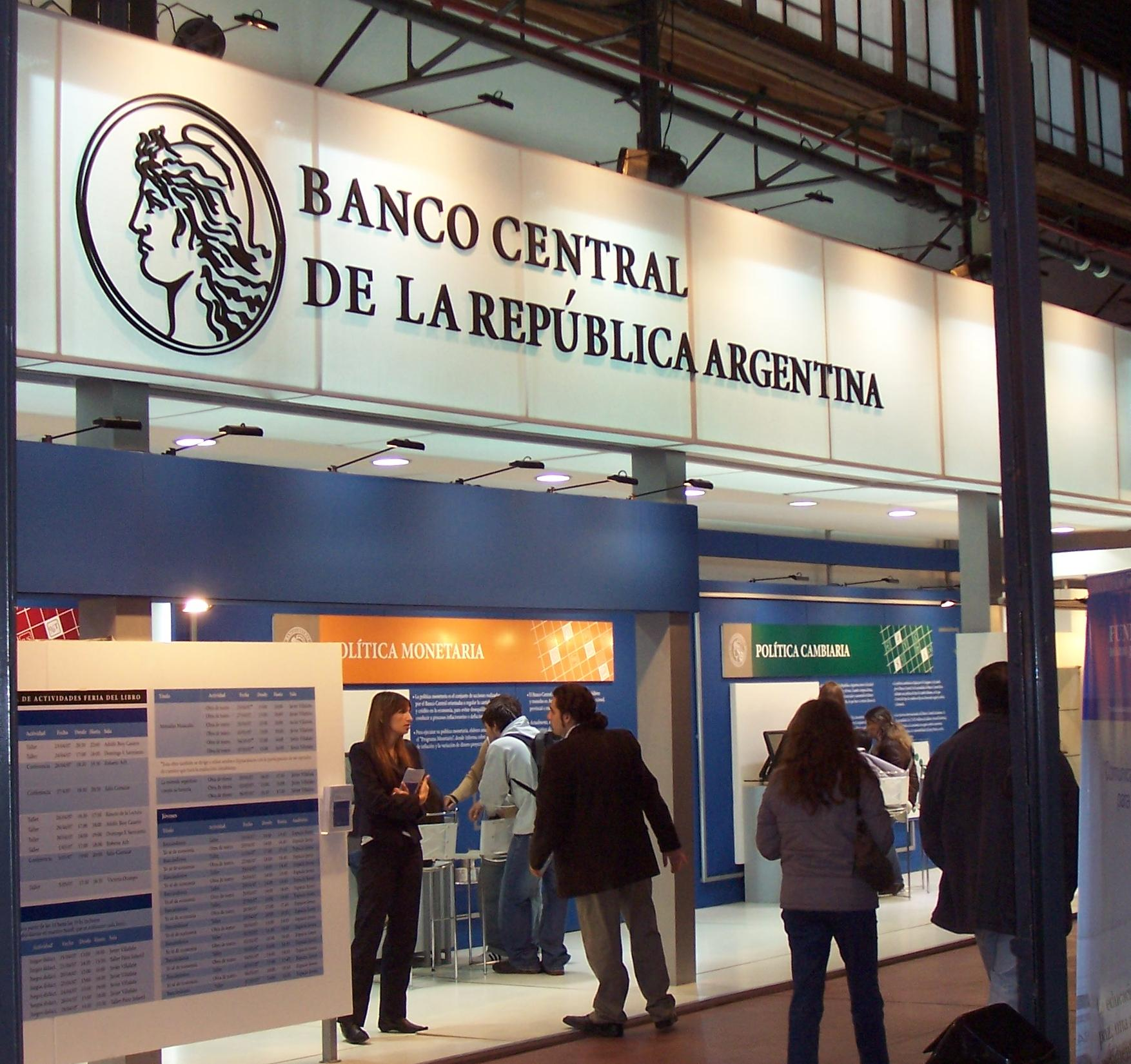 Estand del Banco Central de la República Argentina en la 33° Fiesta Internacional del Libro en la ciudad de Buenos Aires (Argentina).